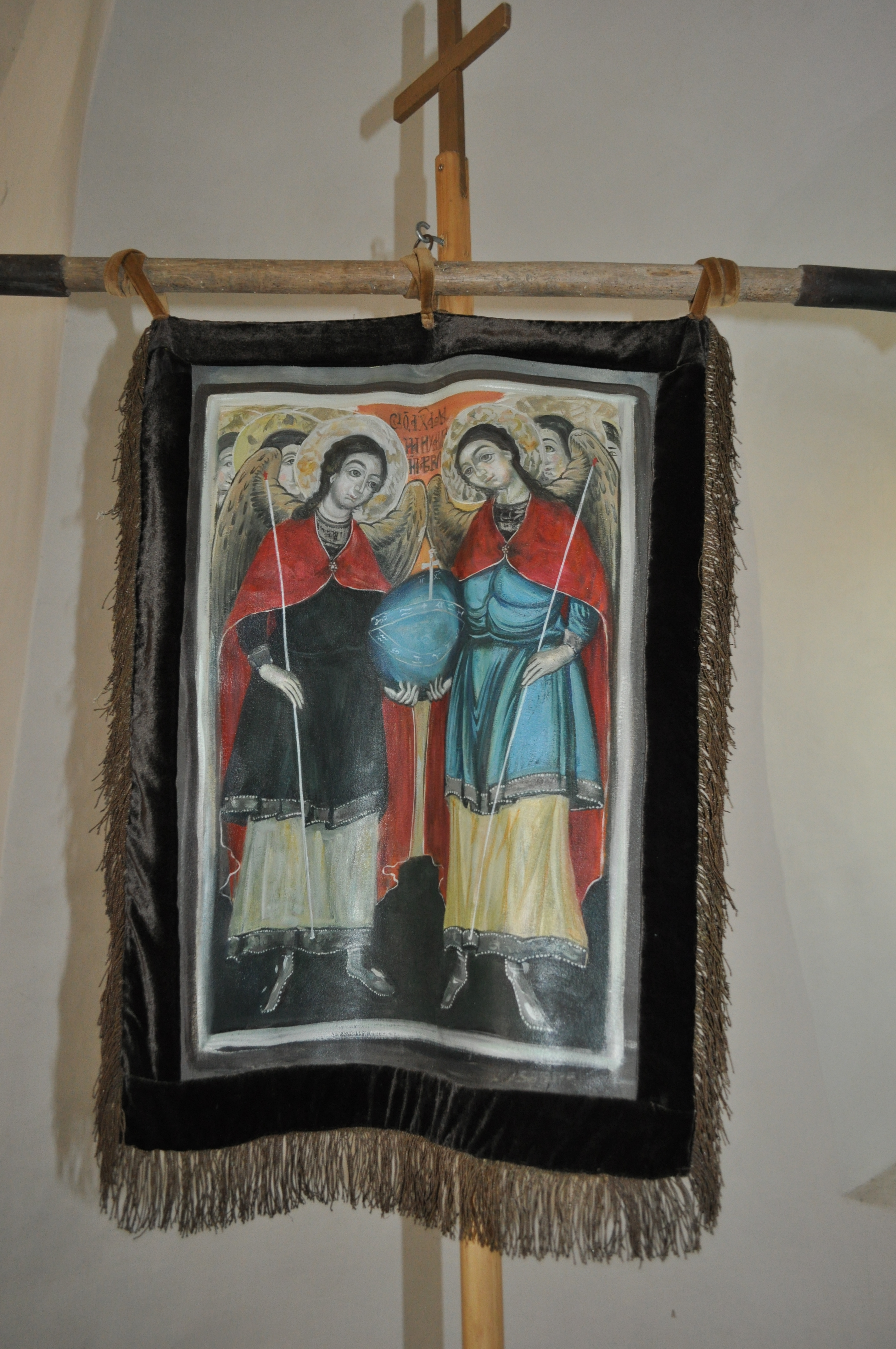 Biserica "Adormirea Maicii Domnului" a mănăstirii Vadului , sat Vad, județul Cluj